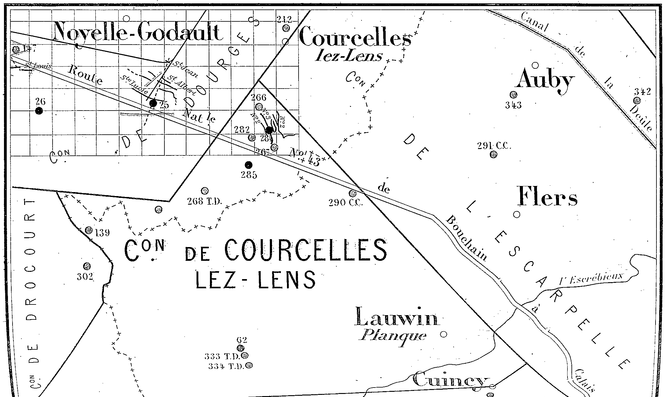 État des travaux de la Société de Courcelles-lez-Lens vers 1880.